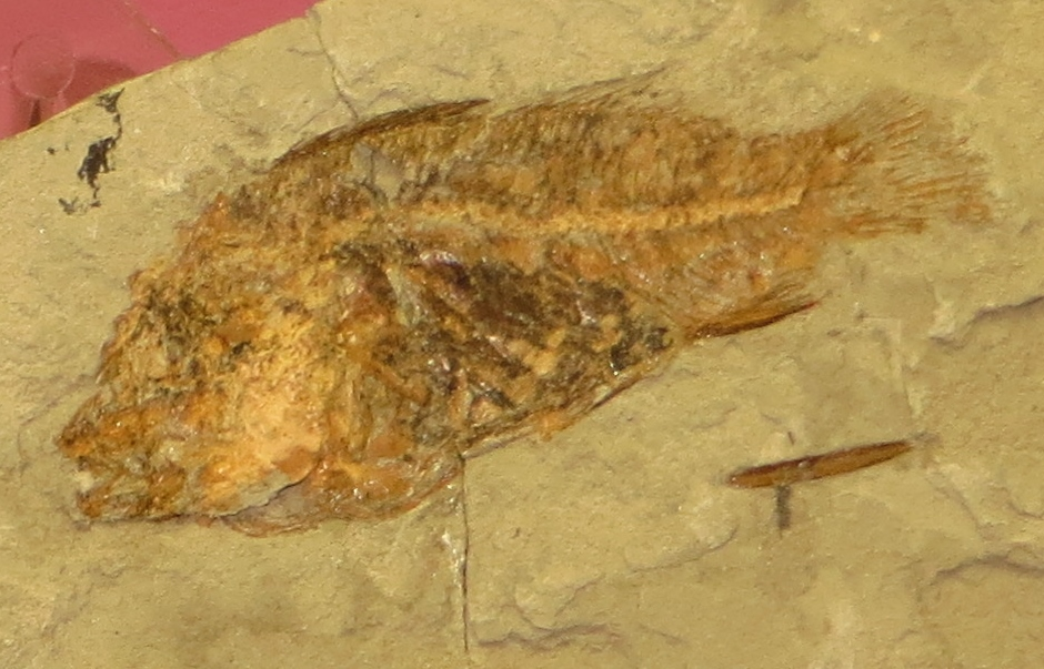 Fossil - took the picture at Museo Scienze Naturali di Faenza